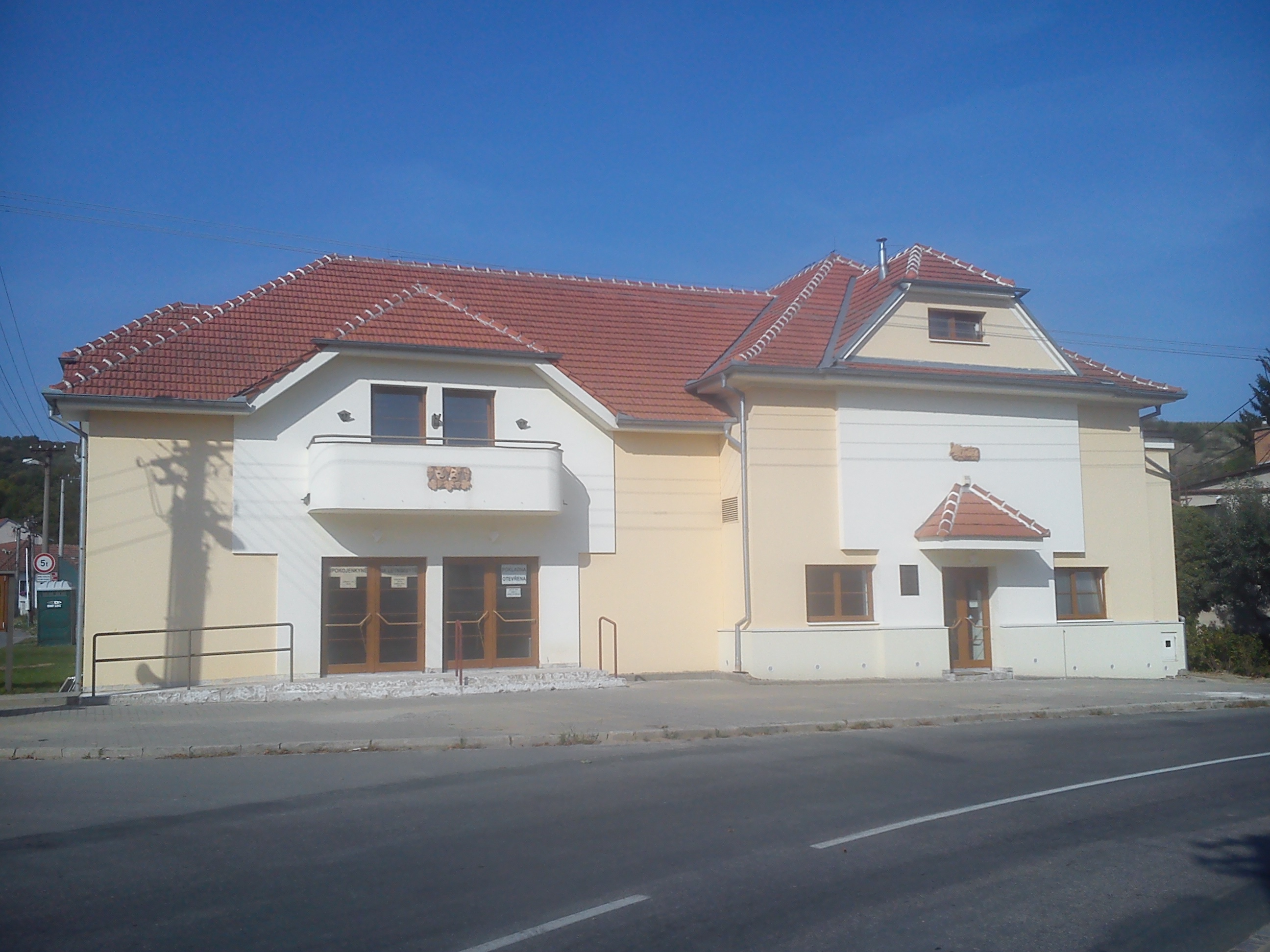 Orlovna a divadlo v Boleradicích